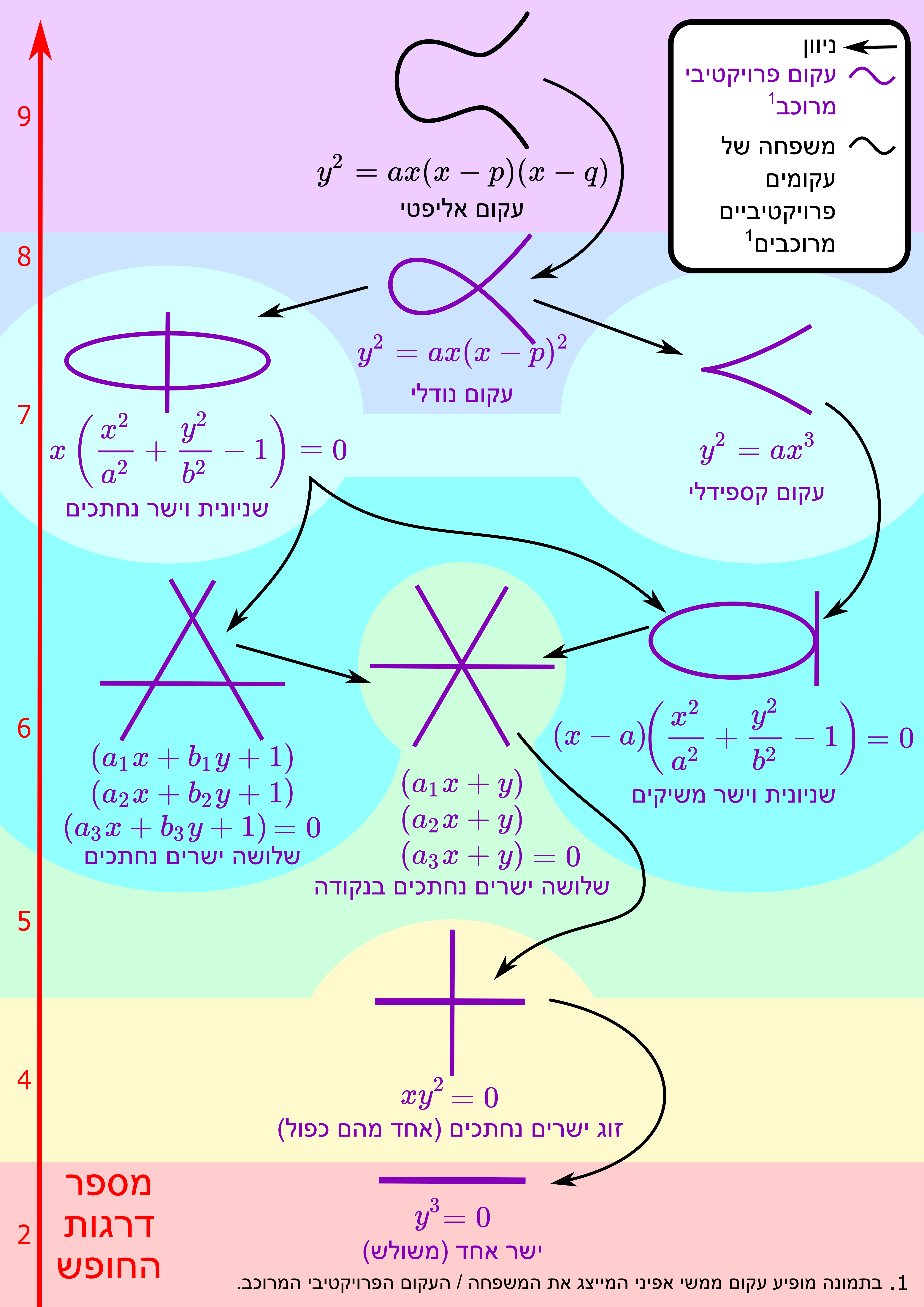 עקומים מישוריים ממעלה 3 והקשרים בינהם ראה גם גרסה וקטורית: File:Cubic_planar_curves.svg